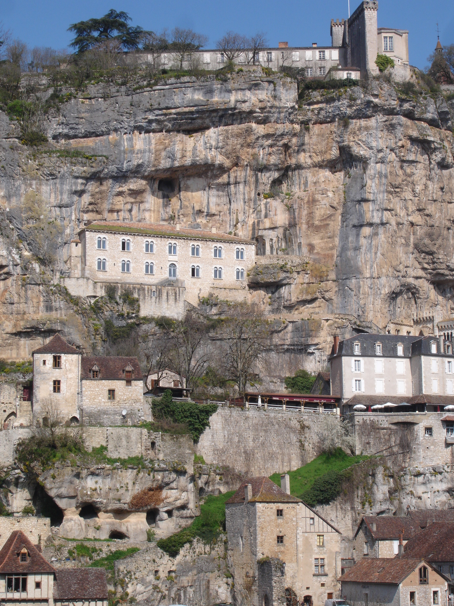 France, Lot (46), Rocamadour